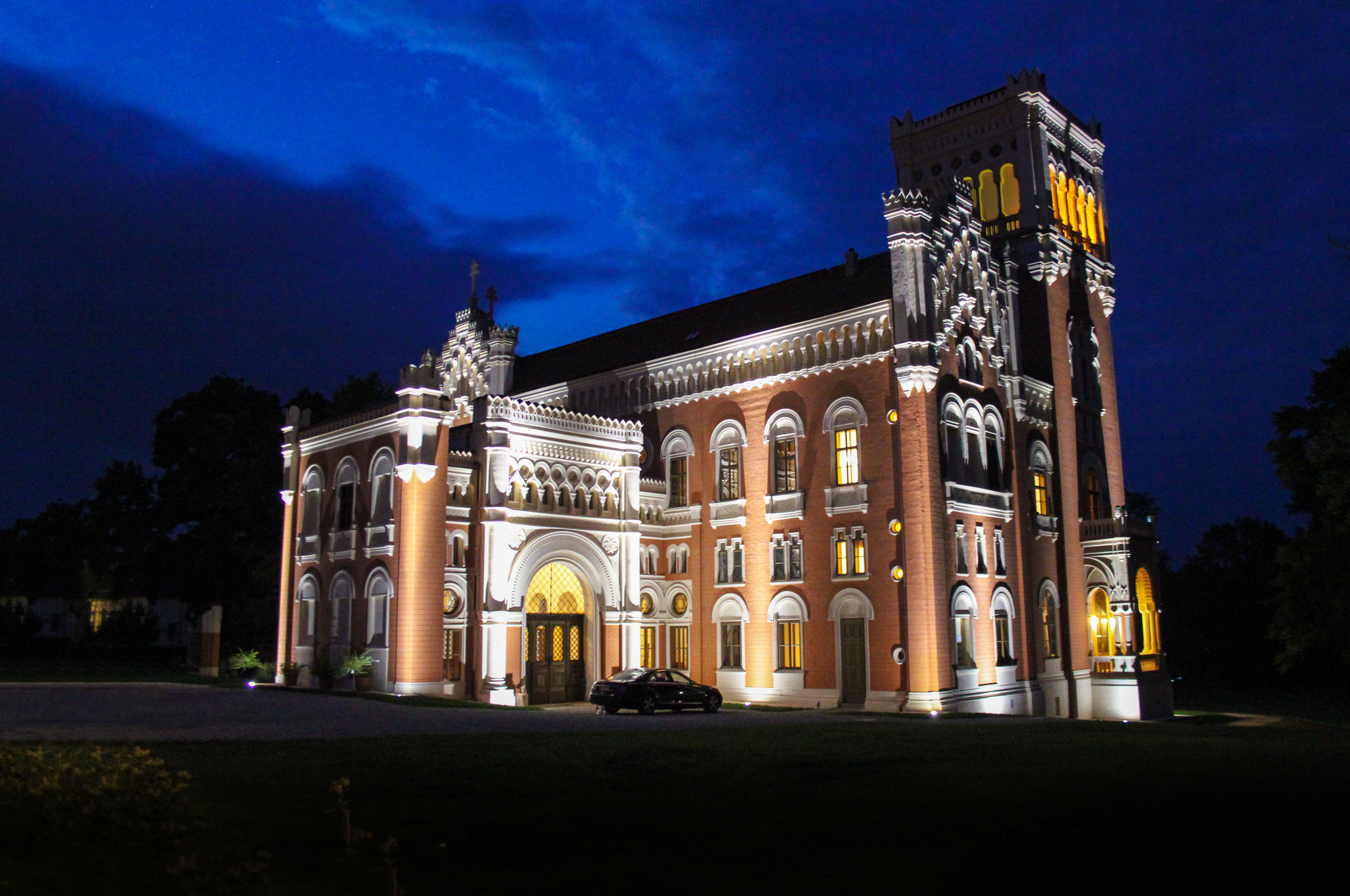 Ein Nachtaufnahme von Schloss Rotenturm nach der Sanierung. Dieses Bild wurde anlässlich des österreichischen Tags des Denkmals 2015 im Burgenland eingereicht.